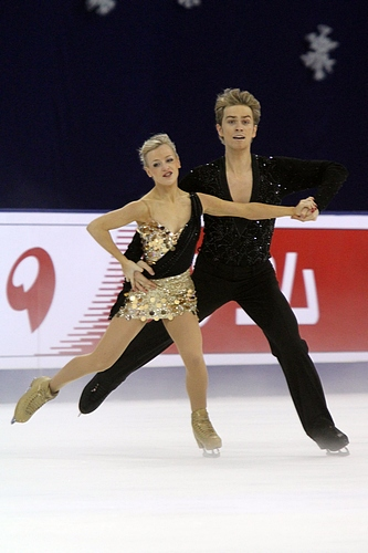 Пенни Кумс и Николас Бакленд на Кубке Китая 2011